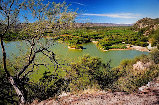 El dique de aguas verdes